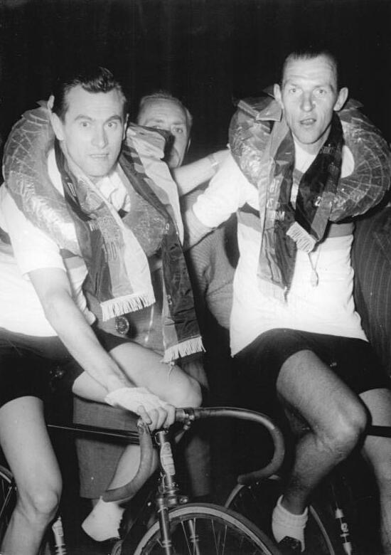 Horst Tüller, Fritz Jährling Zentralbild Wendorf 27.7.1956 DDR-Meisterschaften der Bahnfahrer in Berlin-Weissensee Vom 22.7. bis 28.7.1956 finden die Meisterschaften der Deutschen Demokratischen Republik im Bahnfahren in Berlin-Weissensee statt. Meister im Zweier-Mannschaftsfahrenüber 100 km wurde die Mannchaft Tüller-Jährling mit 3 Runden Vorsprung vor Wahl-Wagner. UBz: Die neuen DDR-Meister im Mannschafts-Zweierfahren Horst Tüller (links) und Fritz Jährling mit ihrem Betreuer bei der Siegerehrung.